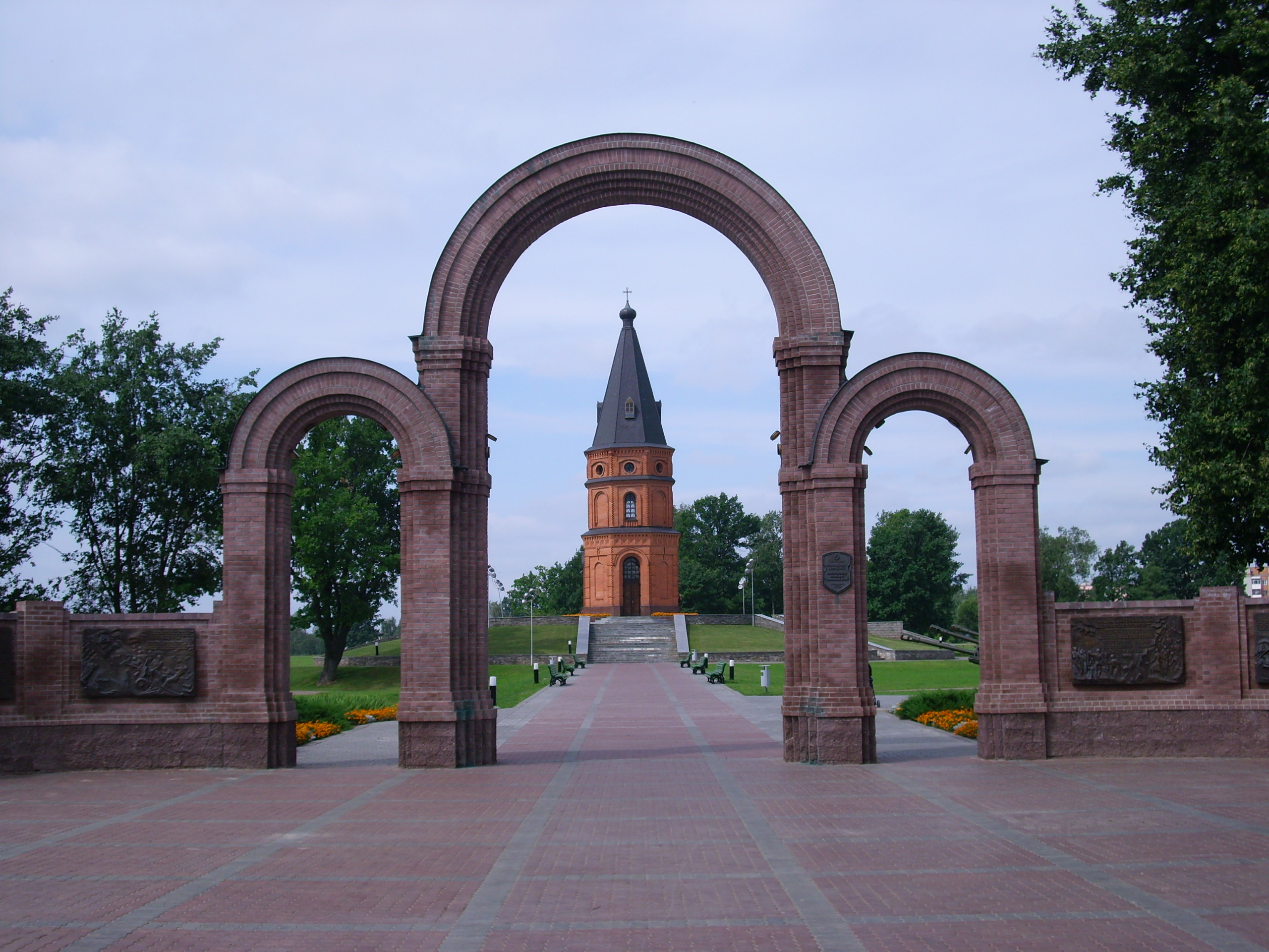 Monument en souvenir des victimes de la seconde guerre mondiale à Moguilev, Biélorussie